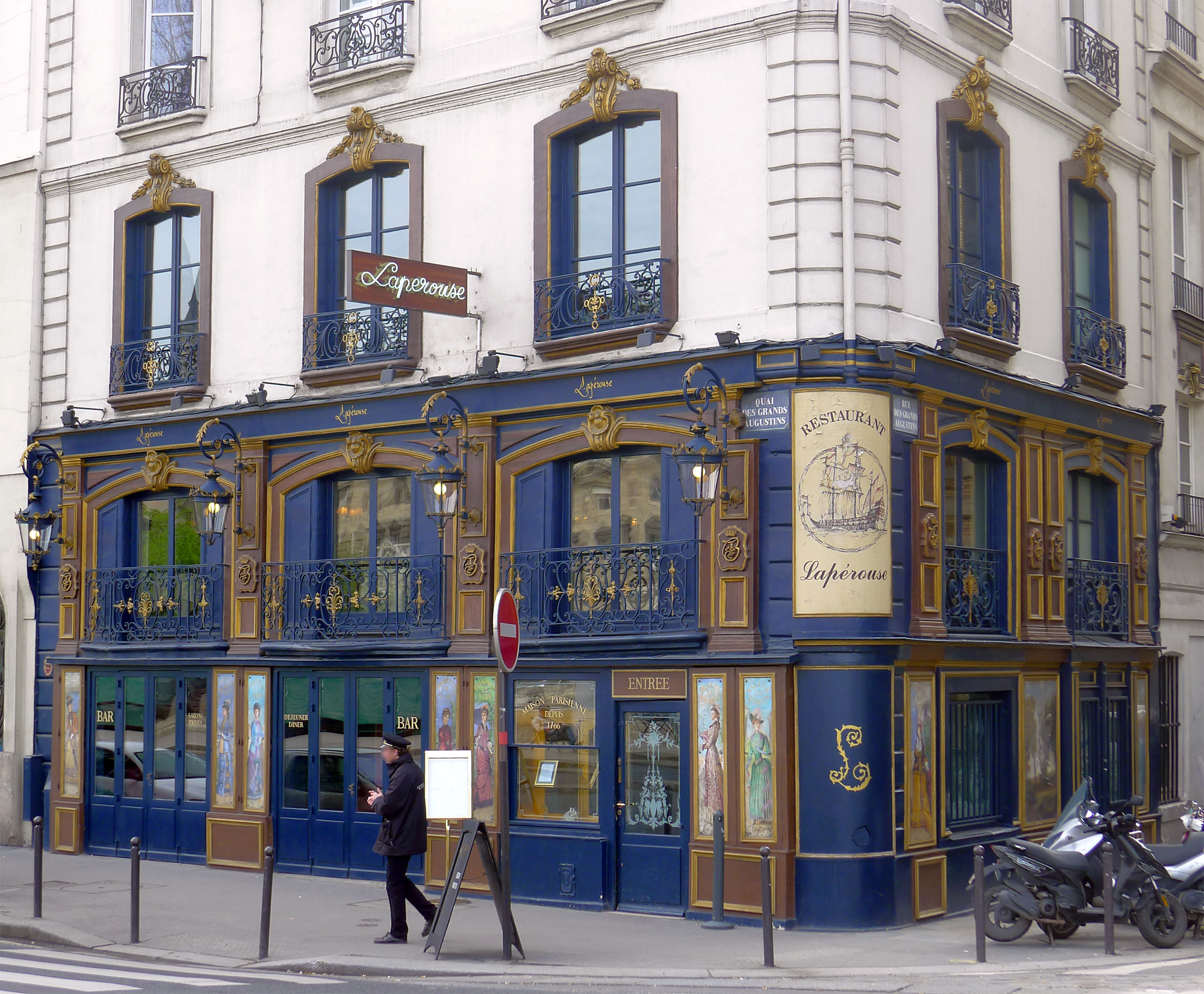 Restaurant Lapérouse (51, quai des Grands-Augustins) - Paris VI